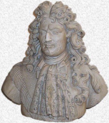 Buste de Duquesne exposé au Musée de la Marine